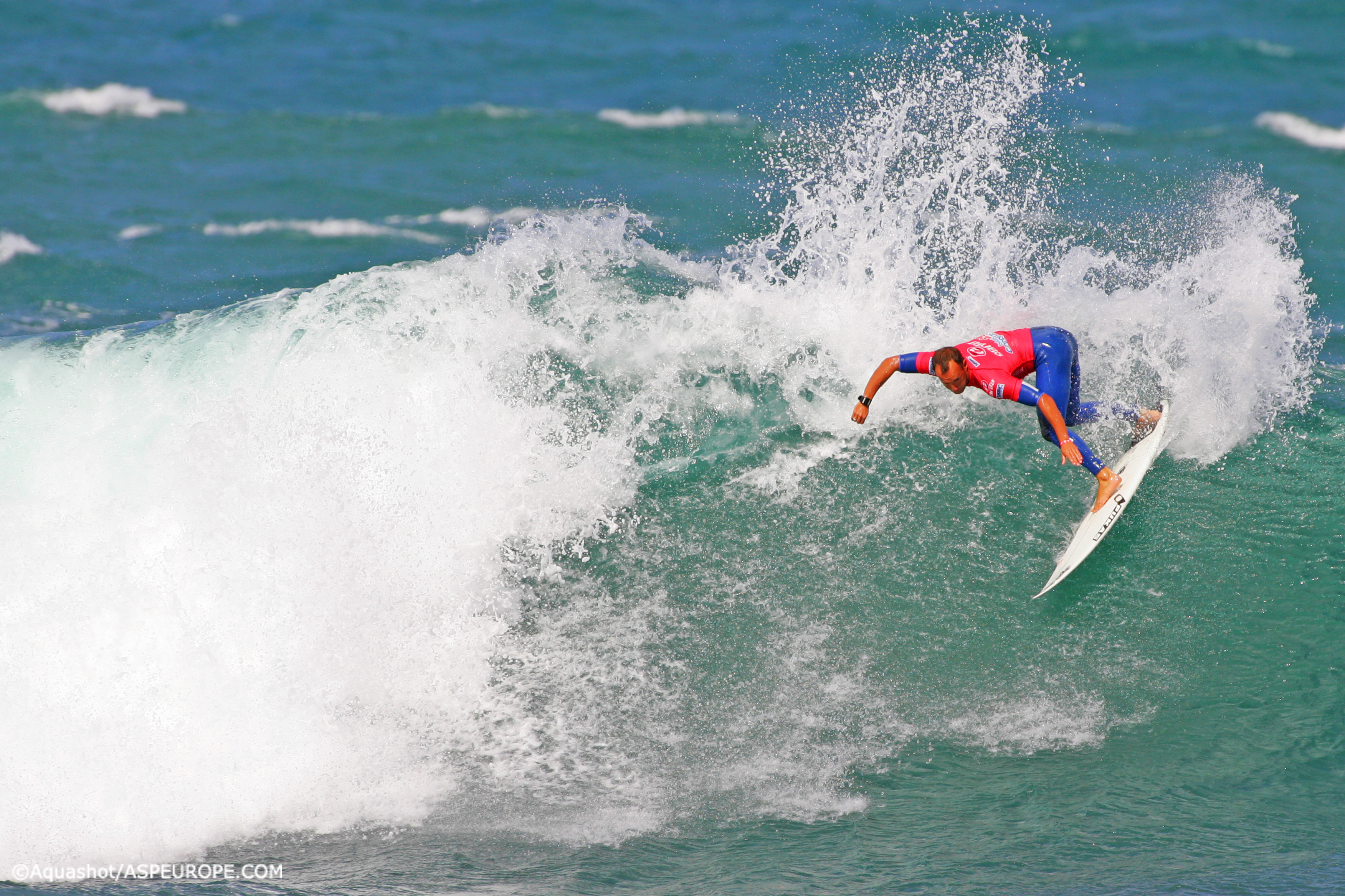 Eneko Acero, 2009ko Islas Canarias Santa Pro